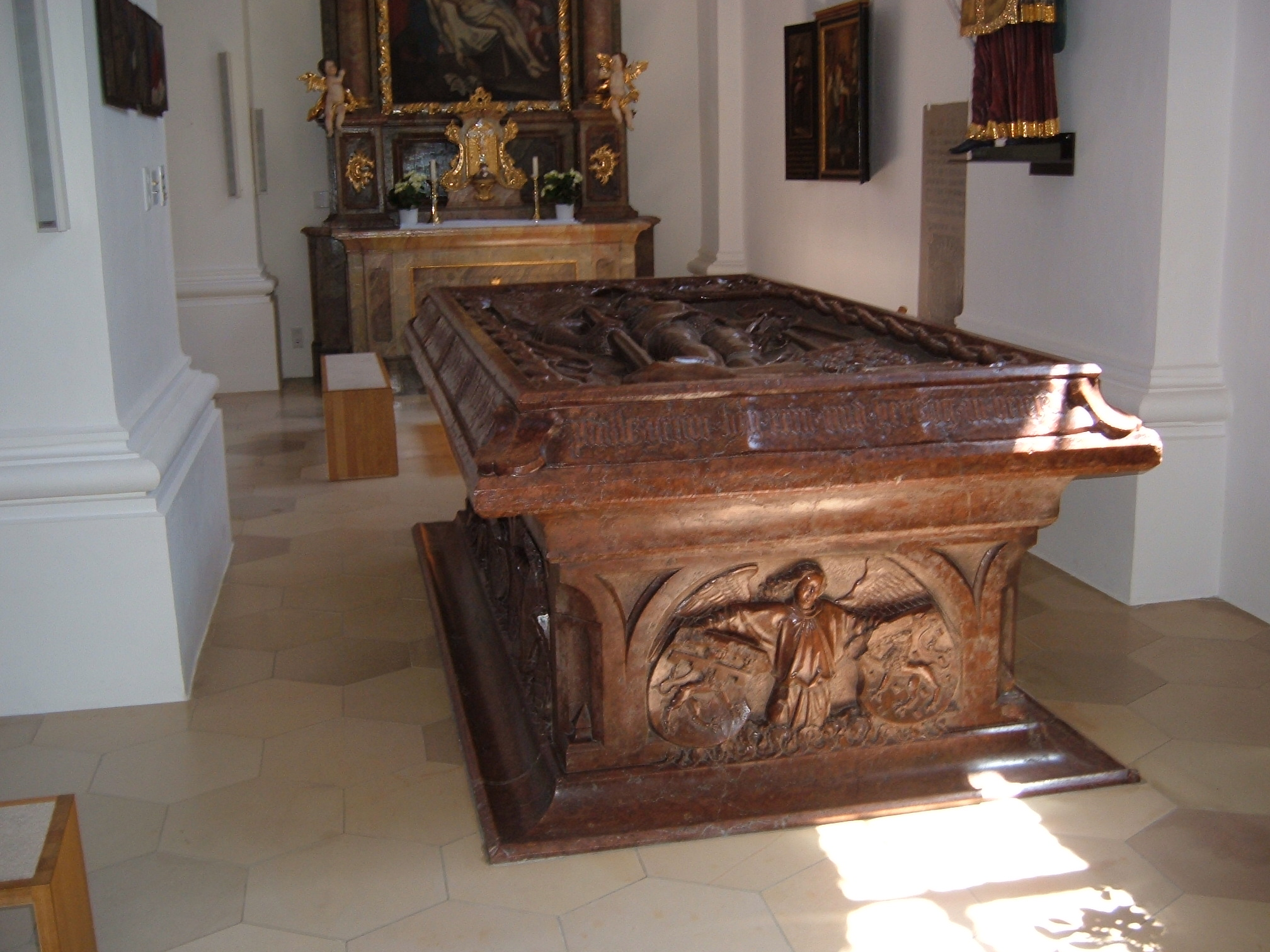 Bildbeschreibung: Tumba Ottos II. von Neumarkt in der Hofkirche in Neumarkt